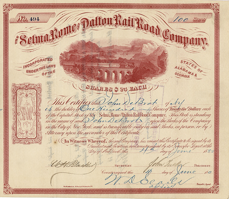 Share of the Selma, Rome and Dalton Rail Road Company from teh 4th June 1880